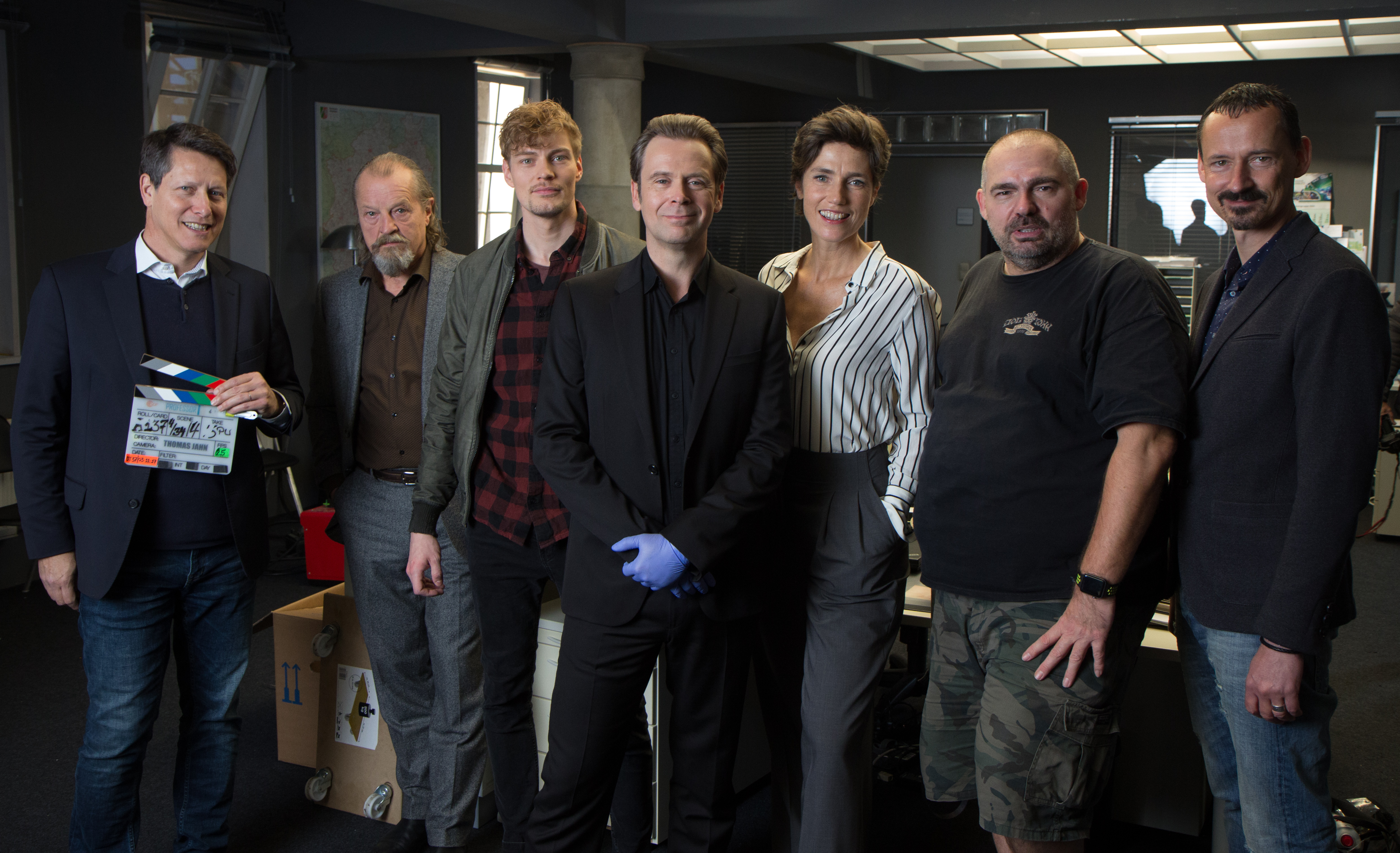 Pressetermin am Set der ZDF-Krimiserie "Professor T." mit den Hauptdarstellern Matthias Matschke, Andreas Helgi Schmid, Paul Faßnacht, Julia Bremermann und Axel Schneider. V.l.n.r.: Sam Davis, Produzent; Paul Faßnacht, Darsteller; Andreas Helgi Schmid, Darsteller; Matthias Matschke, Hauptdarsteller („Professor T.“); Julia Bremermann, Darstellerin; Thomas Jahn, Regisseur; Matthias Pfeifer, verantw. ZDF-Redakteur